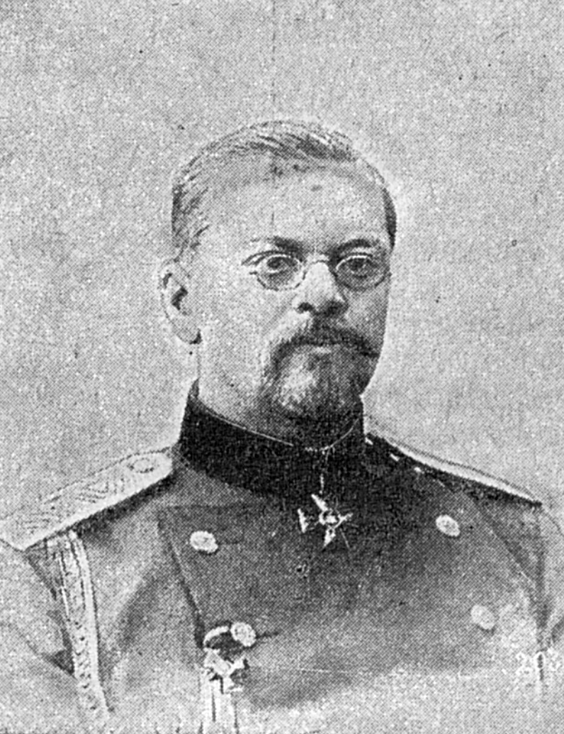 Редигер, Александр Фёдорович